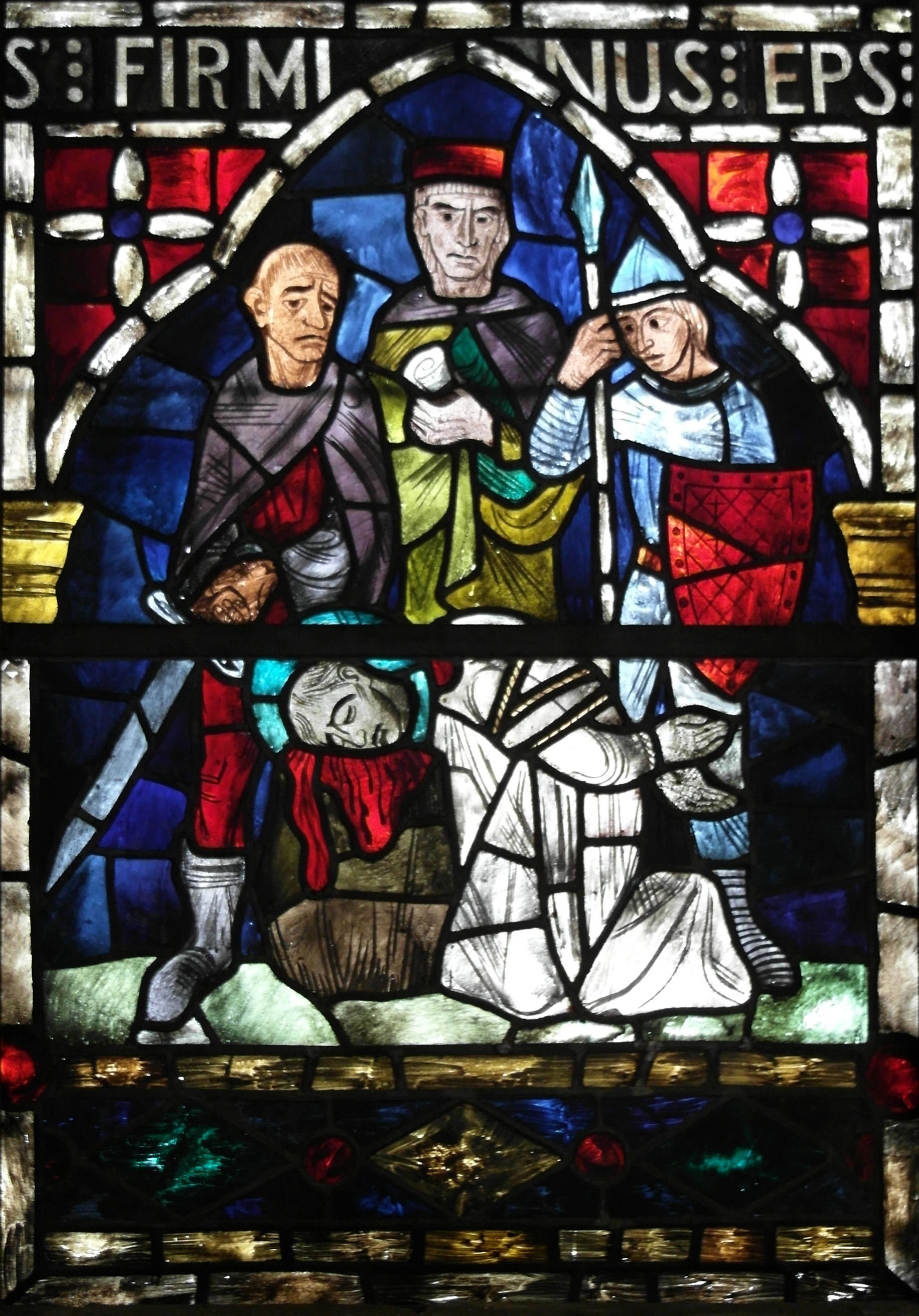 Decapitación de san Fermín, detalle de vidriera, Roncesvalles.